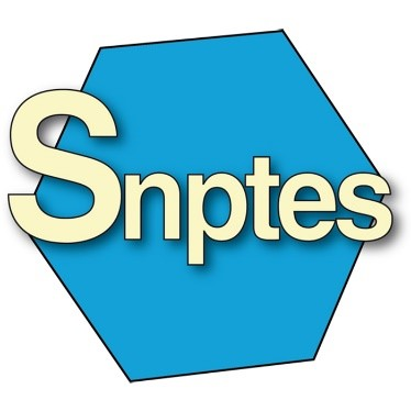 Logo du SNPTES, depuis mai 2014